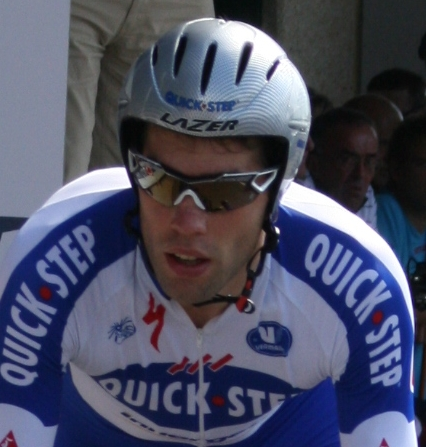 Maarten Wynants aux championnats de Belgique du contre-la-montre, à Mouscron